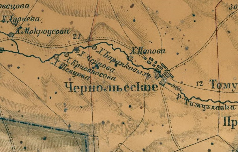 Село Чернолесское на «Карте Ставропольской губернии составленной при ставропольской губернской чертёжной по новым сведениям по указаниям и под непосредственным наблюдением ставропольского губернатора, генерал-майора Н. Е. Никифораки в 1896 году»